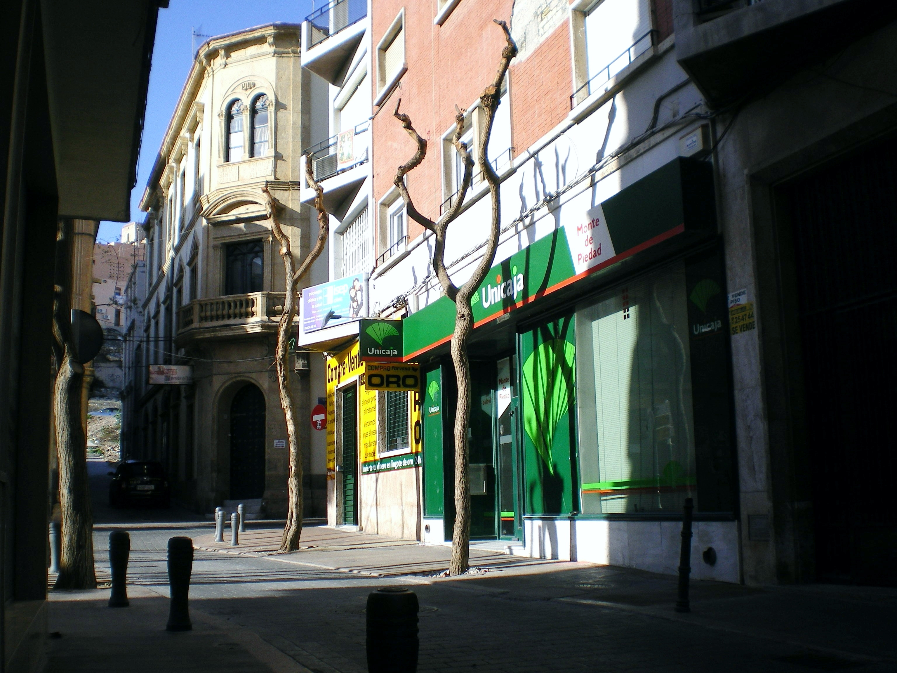 Fotografía de la Plaza del Monte de Almería, Andalucía, España, desde la calle Hernán Cortés (desde el sur). A la derecha lugar fundacional del Monte de Piedad en 1900 (anterior vivienda de su fundadora), y a la izquierda, primeras oficinas de la Caja de Ahorros de Almería, en 1910.